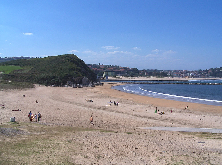 Playa de Cuchia en Miengo (Cantabria).